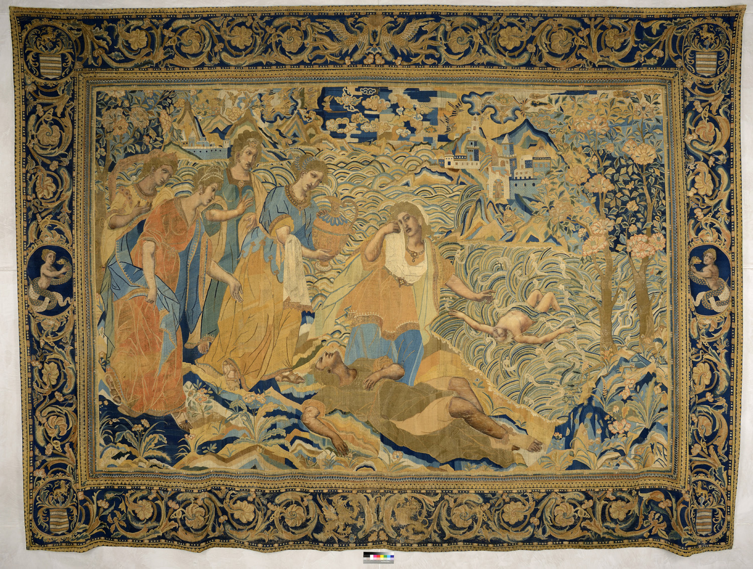 La mort de Polydoros, tapisserie de Macao ; Musée des Beaux-Arts, Lyon, France.